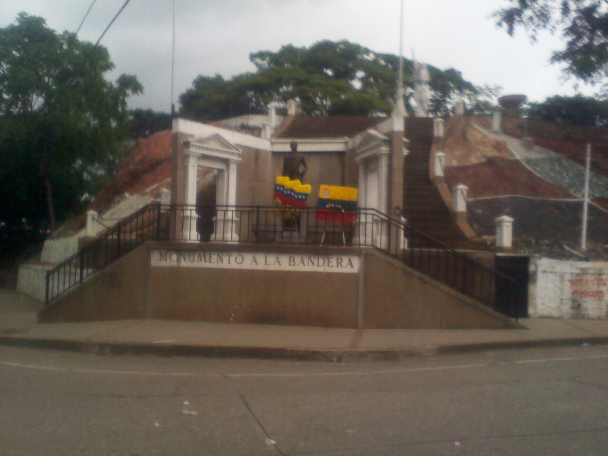 Visita al Monumento a la bandera